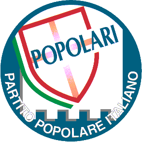 Simbolo PPI 1996